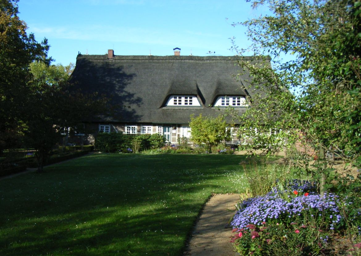 Bauerngarten vom Heidbarghof in Osdorf This is a photograph of an architectural monument.